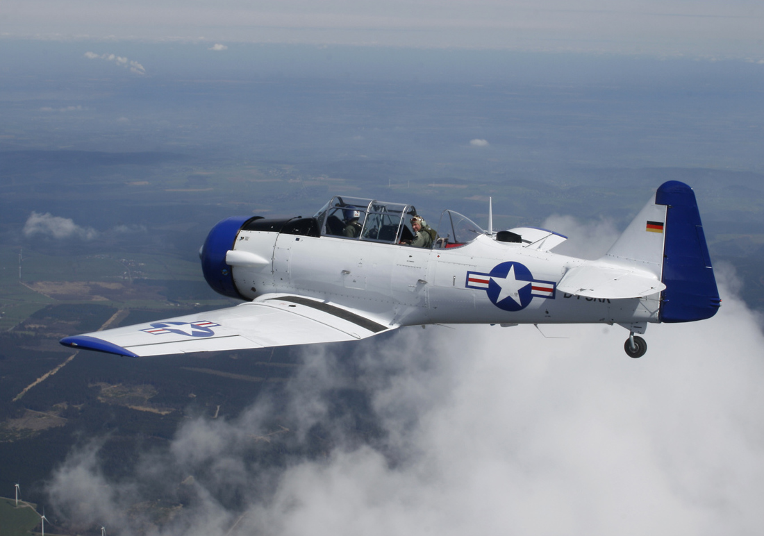 CCF (Canadian Car Foundry) Harvard Mk. IV D-FUKK